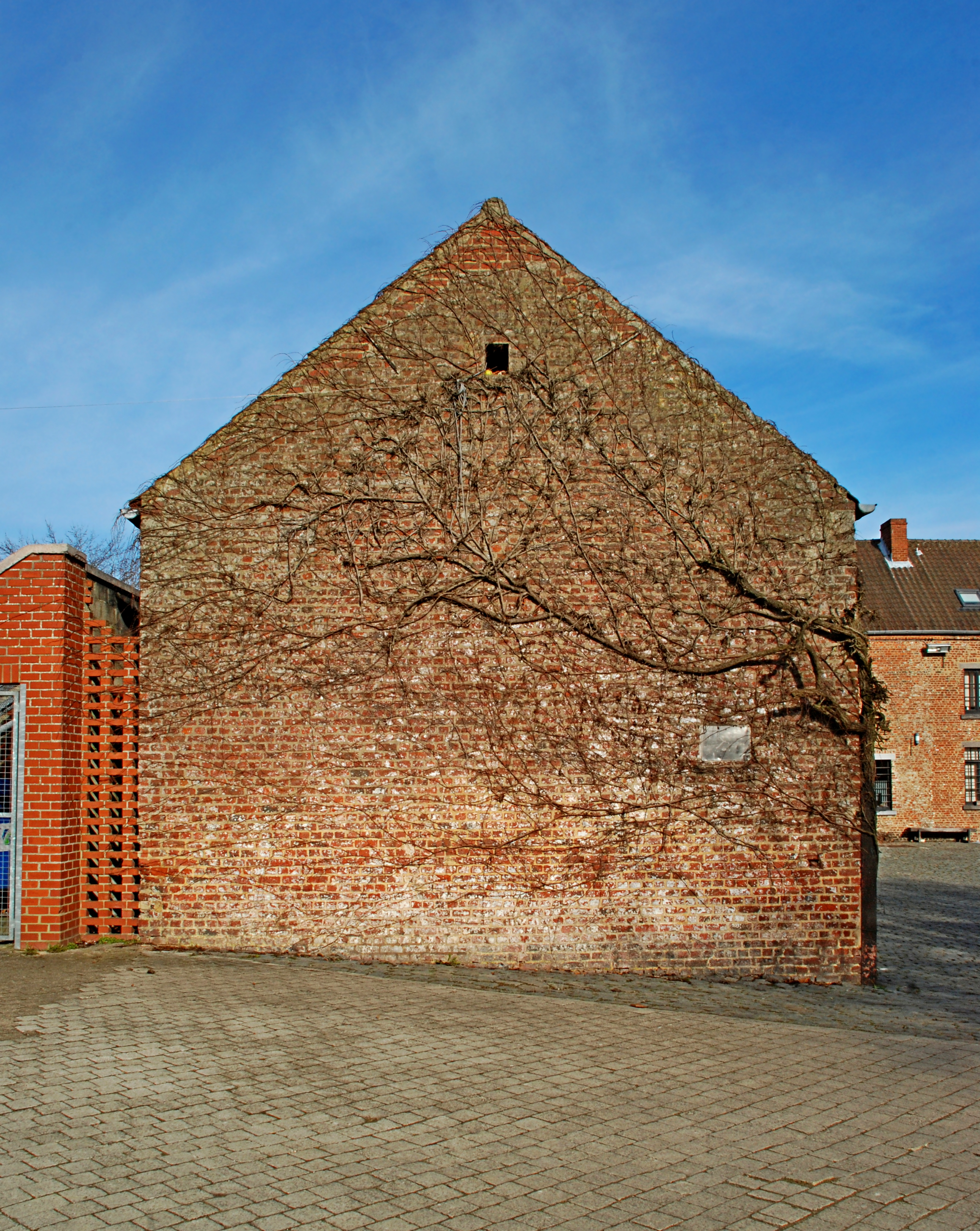 Belgique - Brabant wallon - Ottignies-Louvain-la-Neuve - Ferme de Blocry